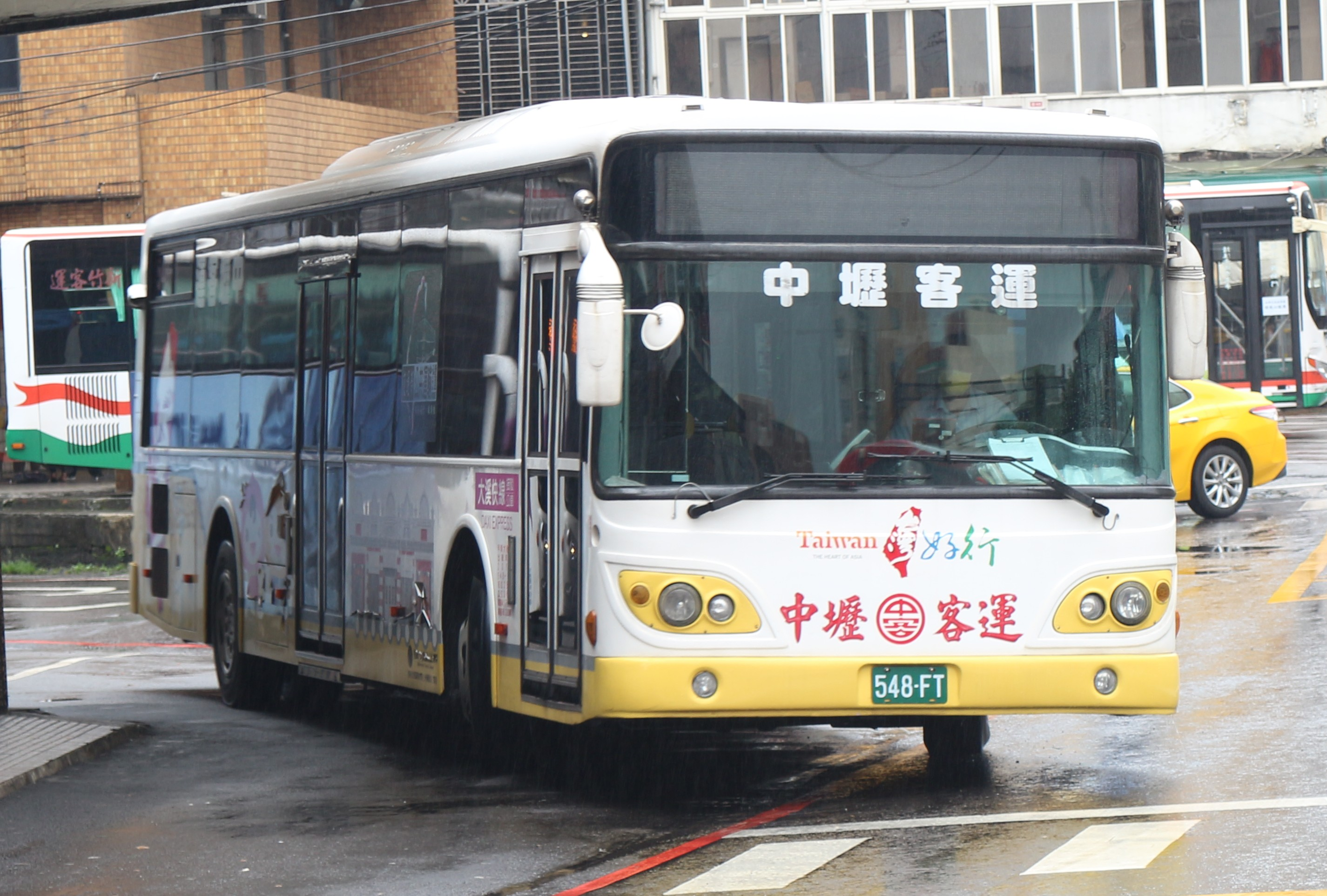 中壢客運 2013 DAEWOO BS120CN 548-FT 台灣好行塗裝大溪快線